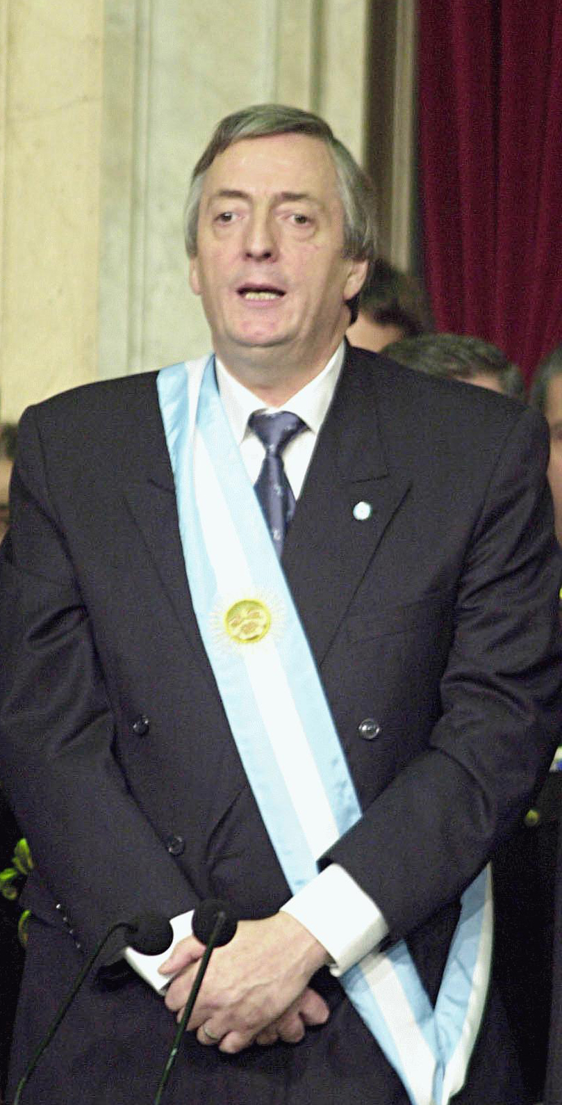 Toma de posesión del ex presidente de Argentina, Néstor Kirchner.